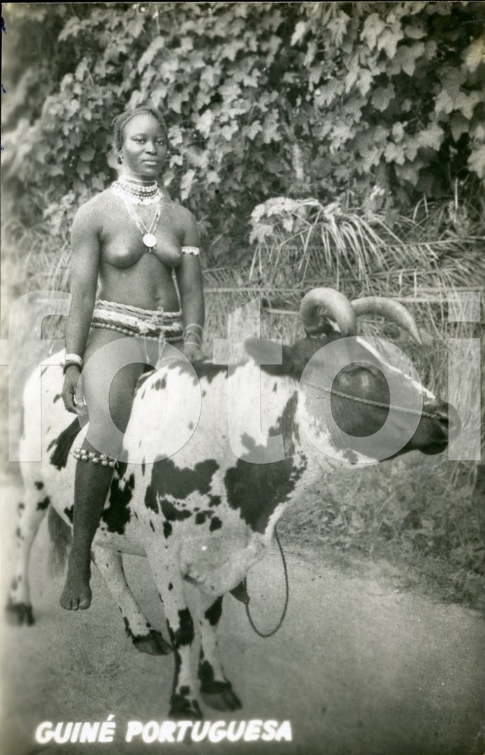 Postcard: Casa Mendes No 06-A - Vaqueira Manjaca - Pecixe